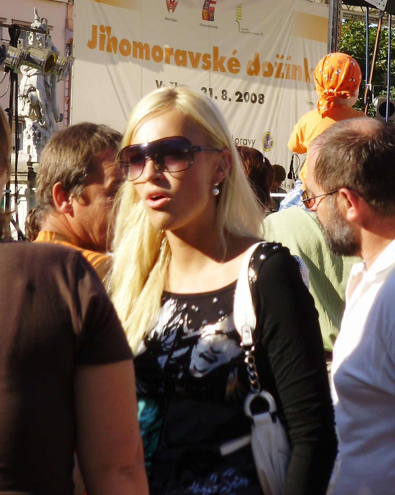 Renata Langmannová - Dožínky srpen 2008 Vyškov